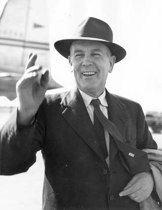 Ben Chifley